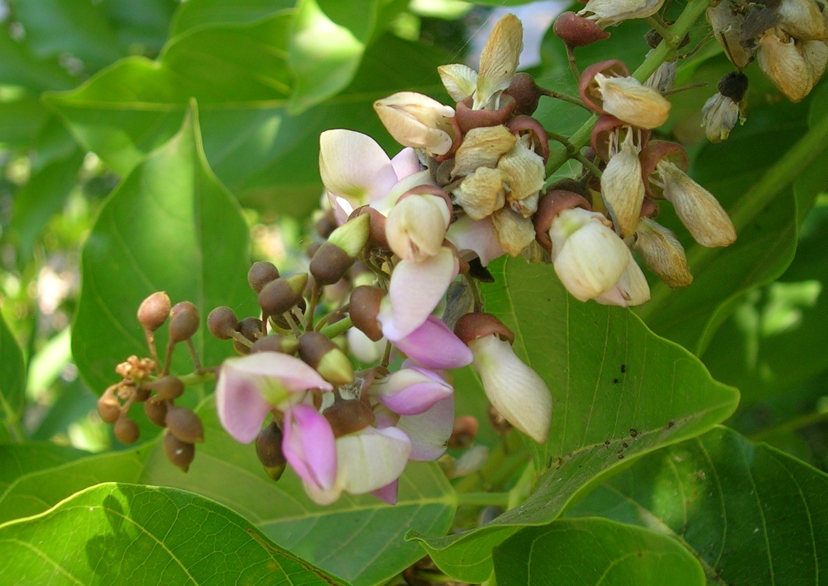 Pongamia pinnata (Millettia pinnata) from Karnataka India